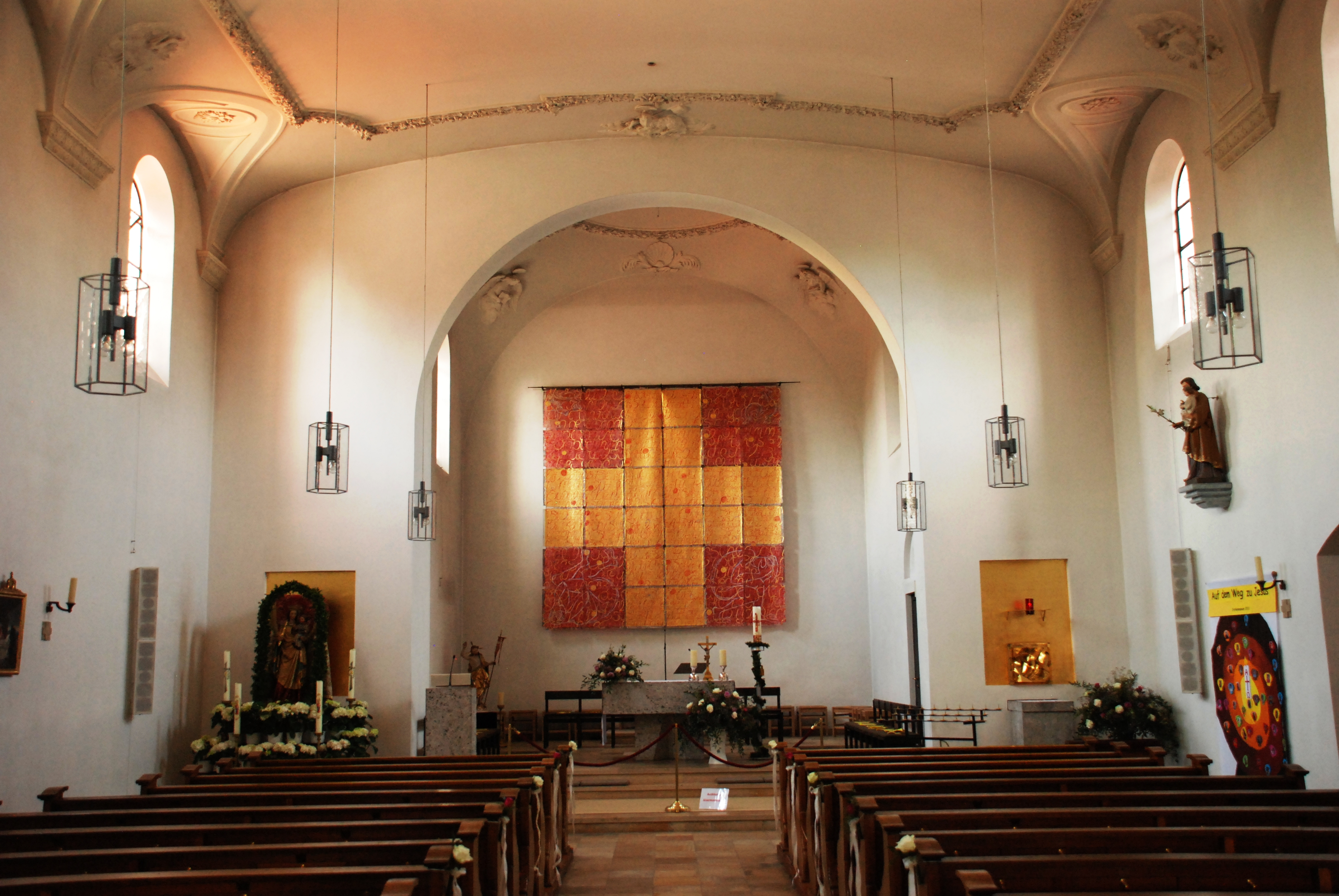 Innenraum der denkmalgeschützten katholischen Pfarrkirche "St. Peter und Paul" in Aschheim, Landkreis München